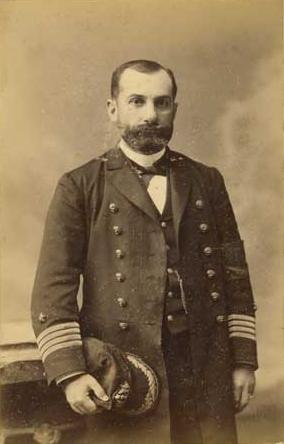 Jorge Montt Álvarez.